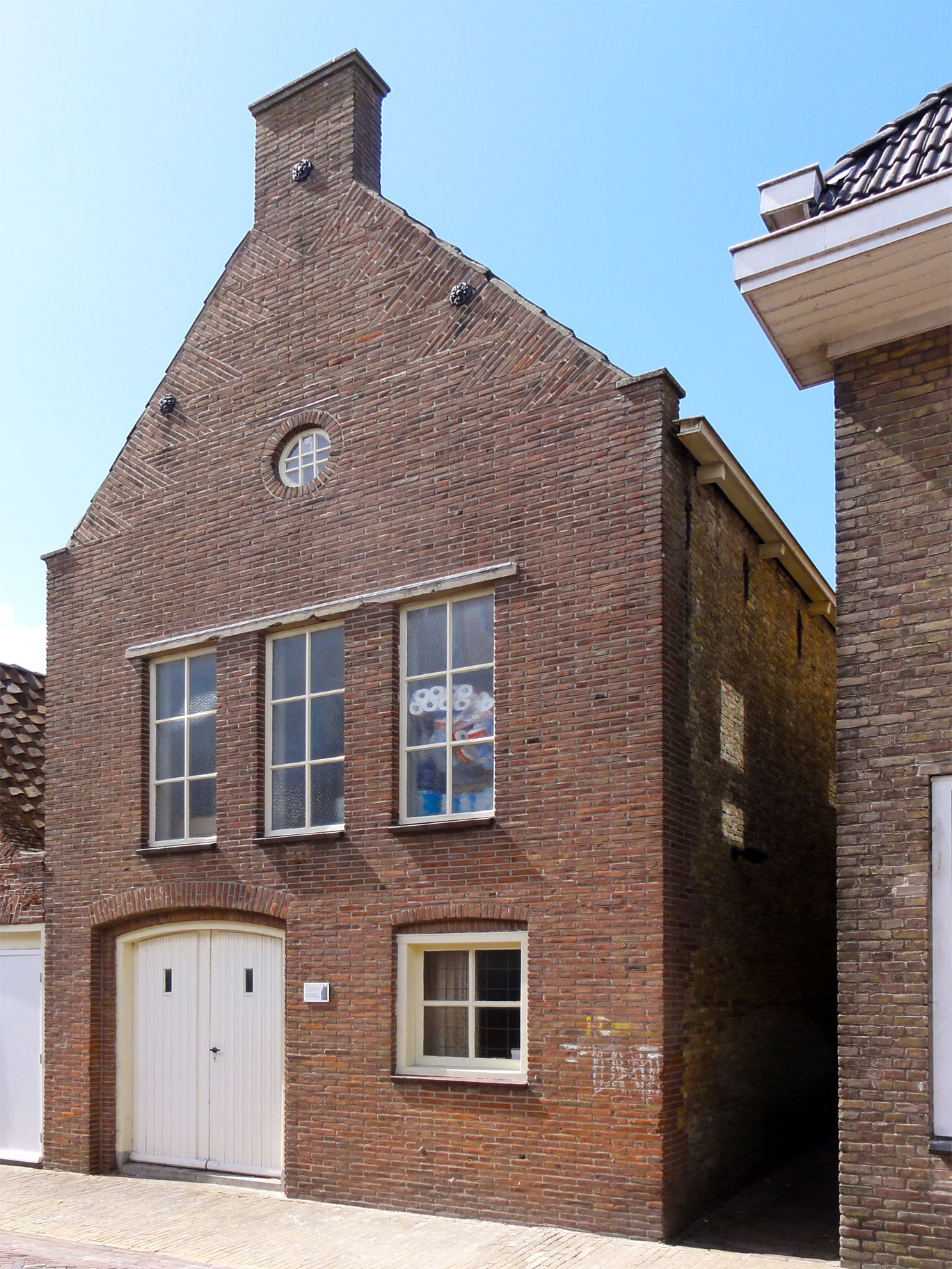 Nije Buorren 9 in Ferwerd